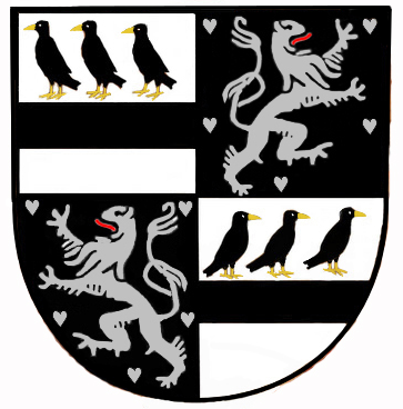 Mit der Erhebung von Johannes Ernst von Reuschenberg in den Reichsfreiherrenstand verlieh der Kaiser Ferdinand III. 1639 auch ein "verbessertes" Wappen, dass sogenannte freiherrliche Wappen.